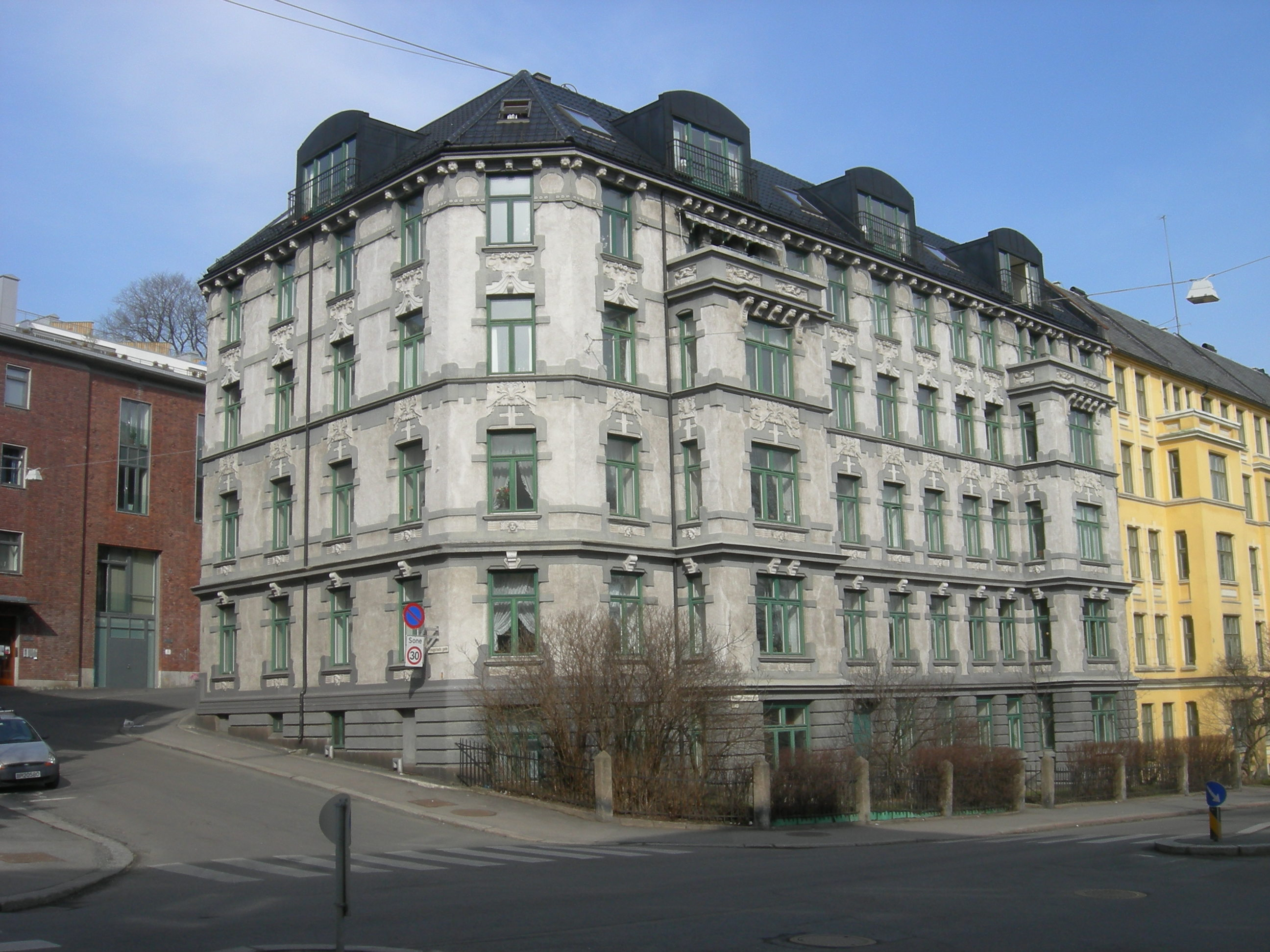 Jugendbygning, Waldemar Thranes gate 40, krysset med Fougstads gate, Oslo